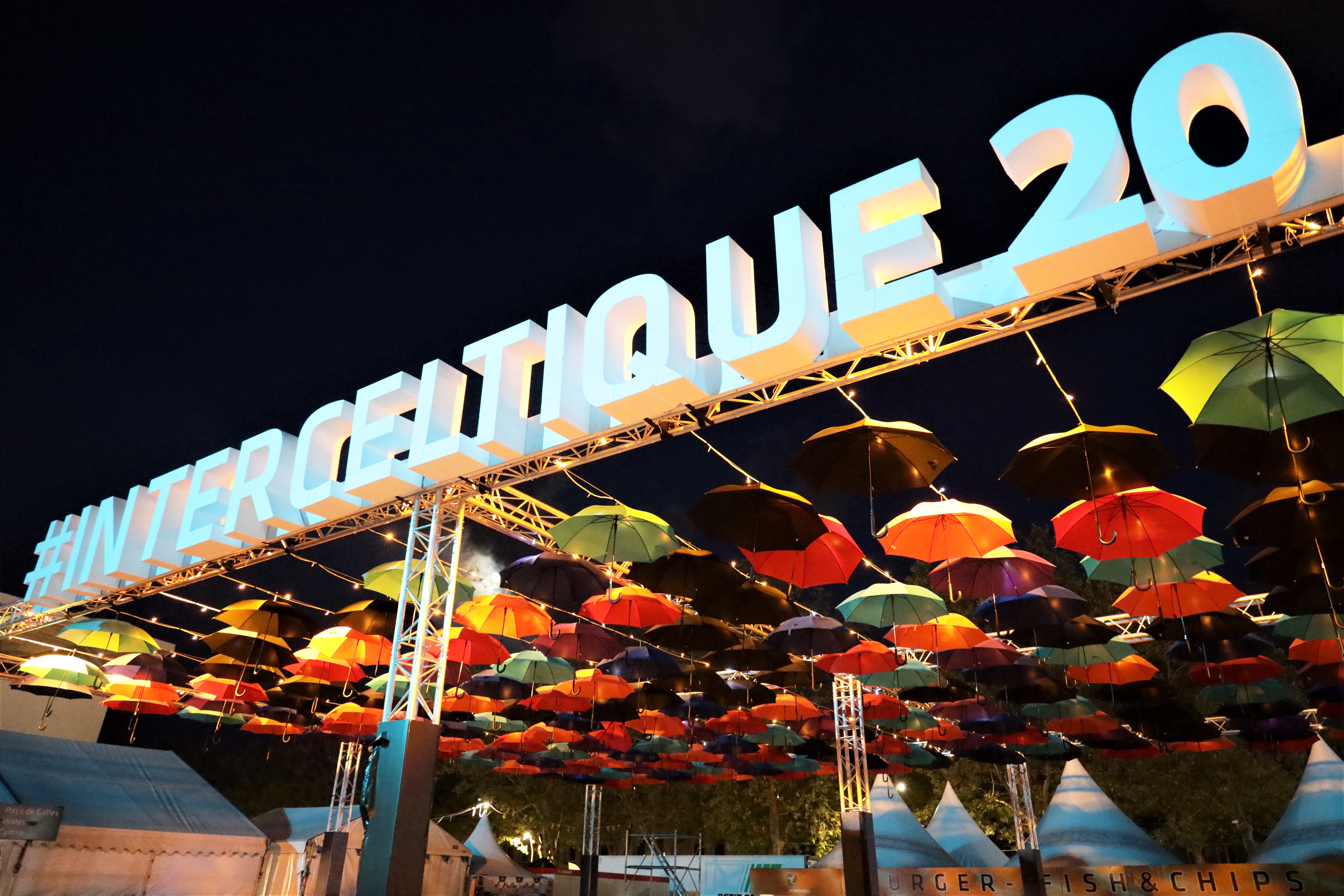 Montage effectué pour annoncer le hashtag de l'édition 2020 du festival interceltique de Lorient, au dernier jour de l'édition précédente.